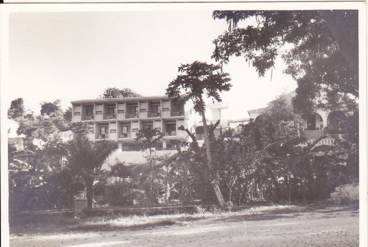 A parte nova da pousada na esquerda(1970) e na direita o edifícío principal